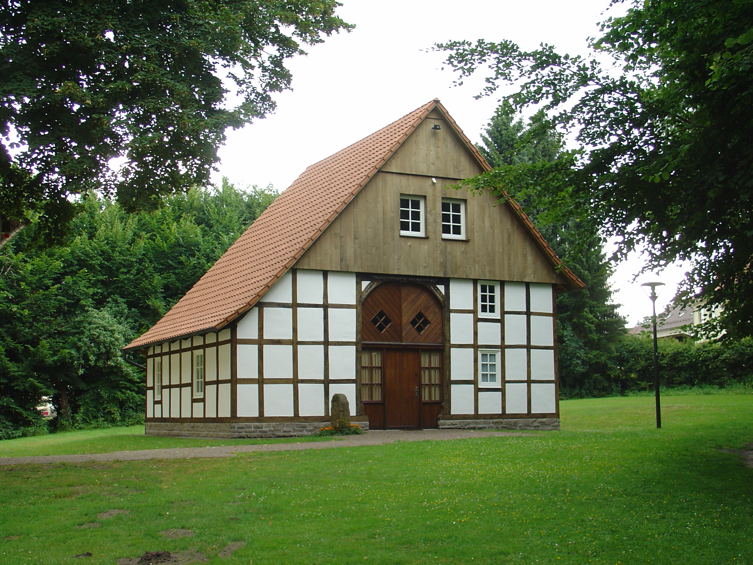 Eines der beiden Heimathäuser in Stukenbrock